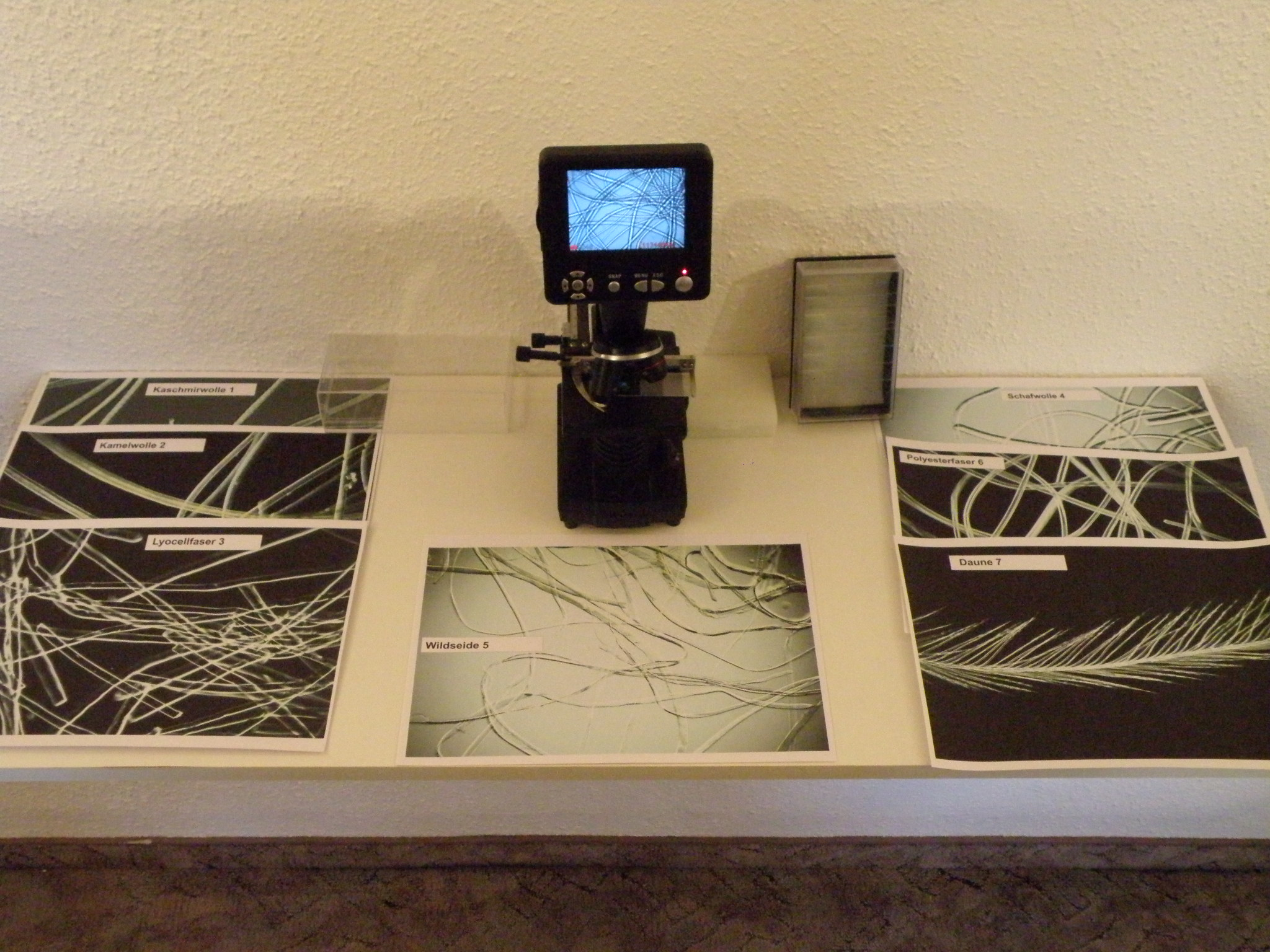 Arbeitsplatz im Betten- u.Schlafmuseum Freiberg zur Untersuchung verschiedener Bettfüllungen wie Schafschurwolle, Wildseide, Cashmirwolle, Kamelwolle, Lyocell, Polyesterfasern sowie Daunen.